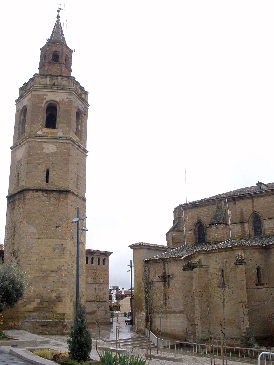 Catedral de Barbastro (Huesca, España)